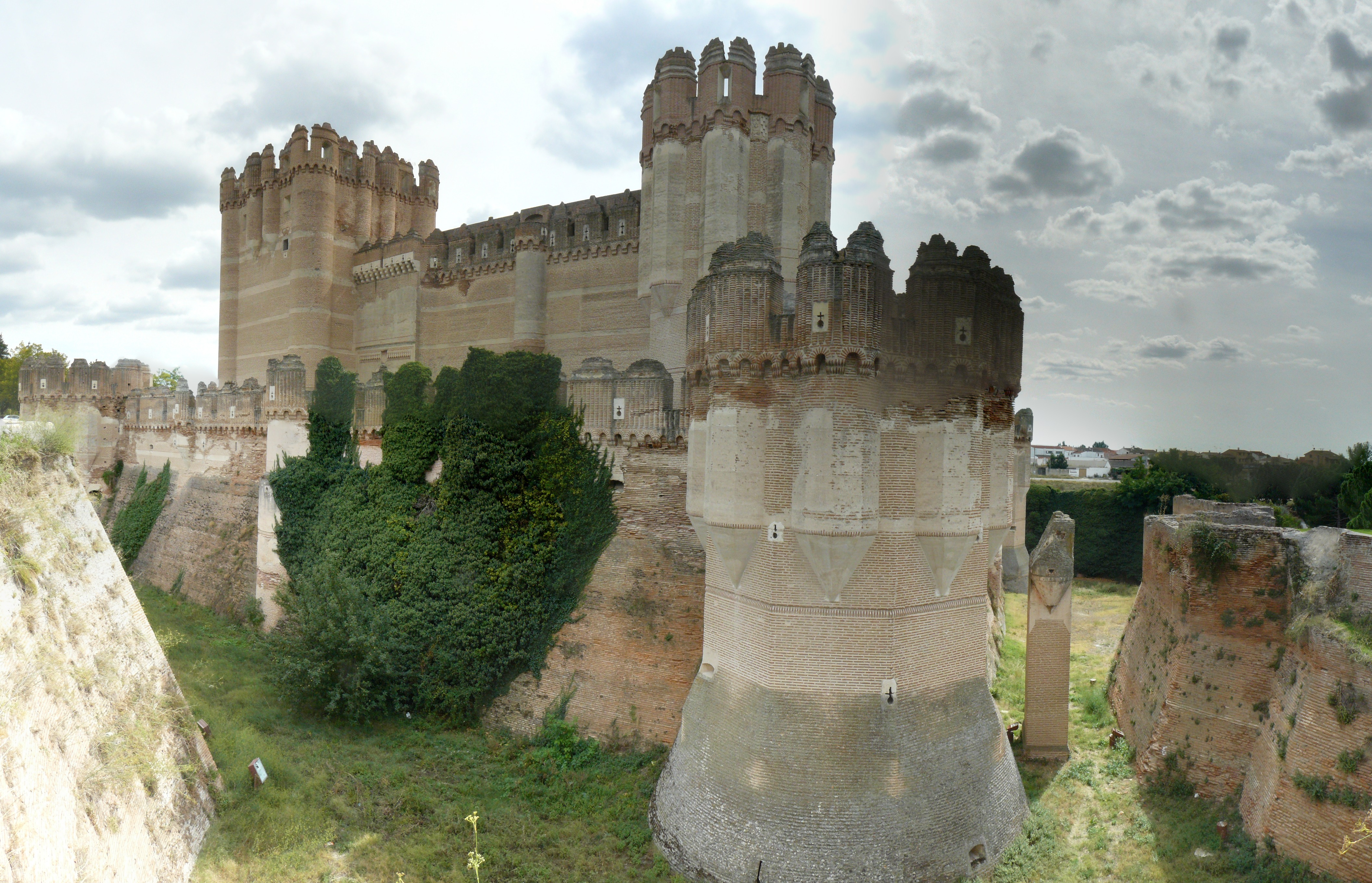 Castillo de Coca, Segovia.